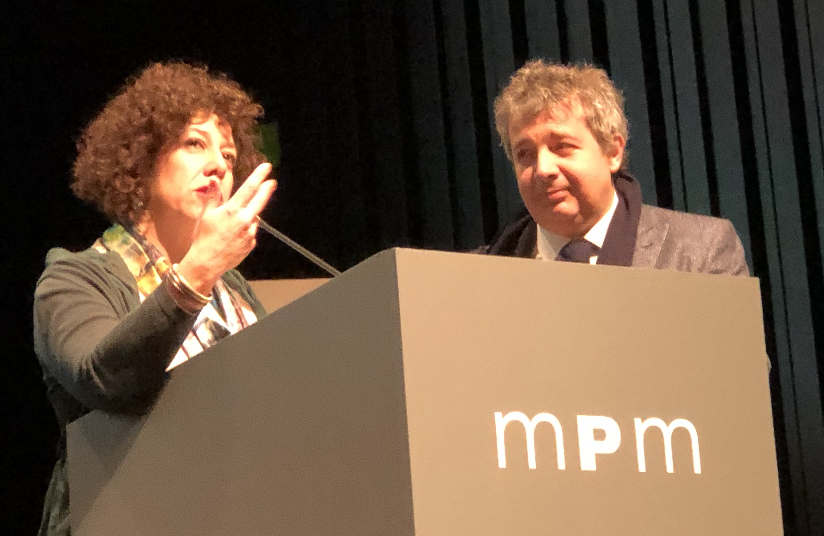 Inauguración del II Festival de Filosofía Malaga